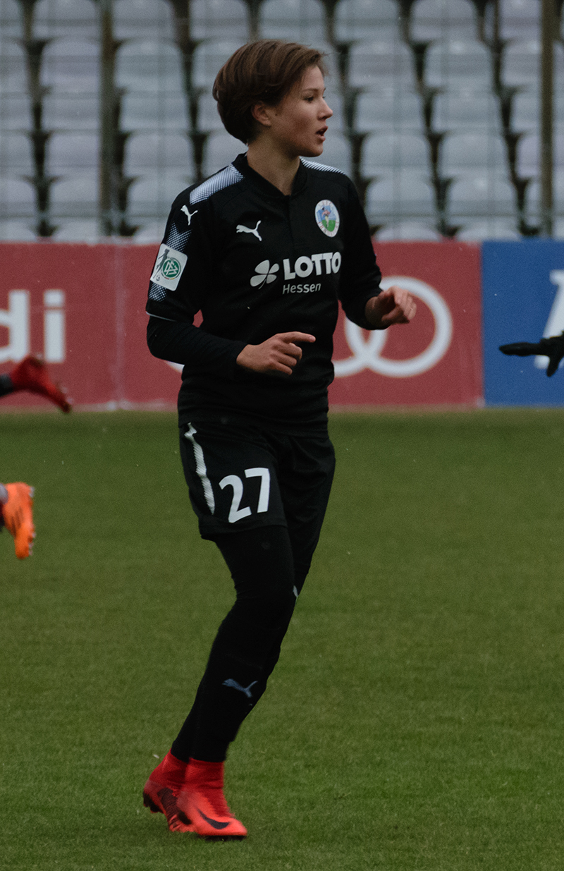 Alexandra Emmerling 2017 vs FC Bayern München (in her second Frauenbundesliga match)